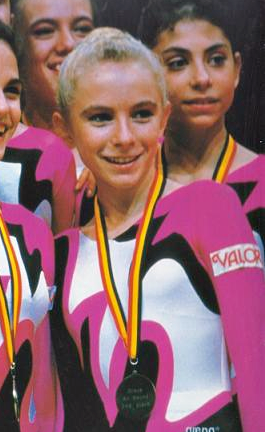 Bárbara Plaza en el podio del Mundial de Bruselas en 1992.